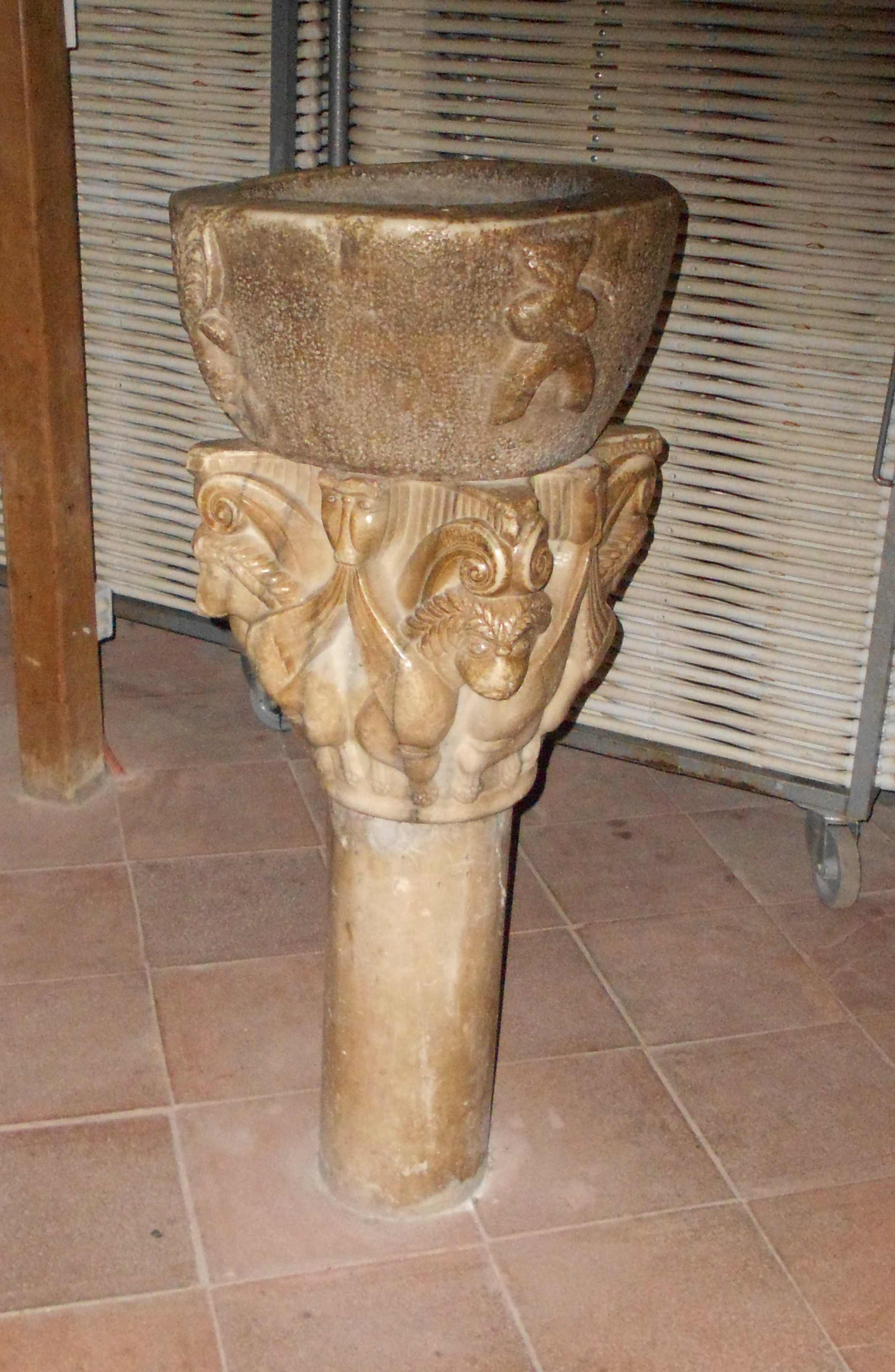 Pica beneitera romànica de Sant Genís de Fontanes.